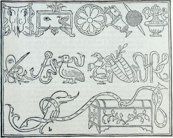 Hypnerotomachia